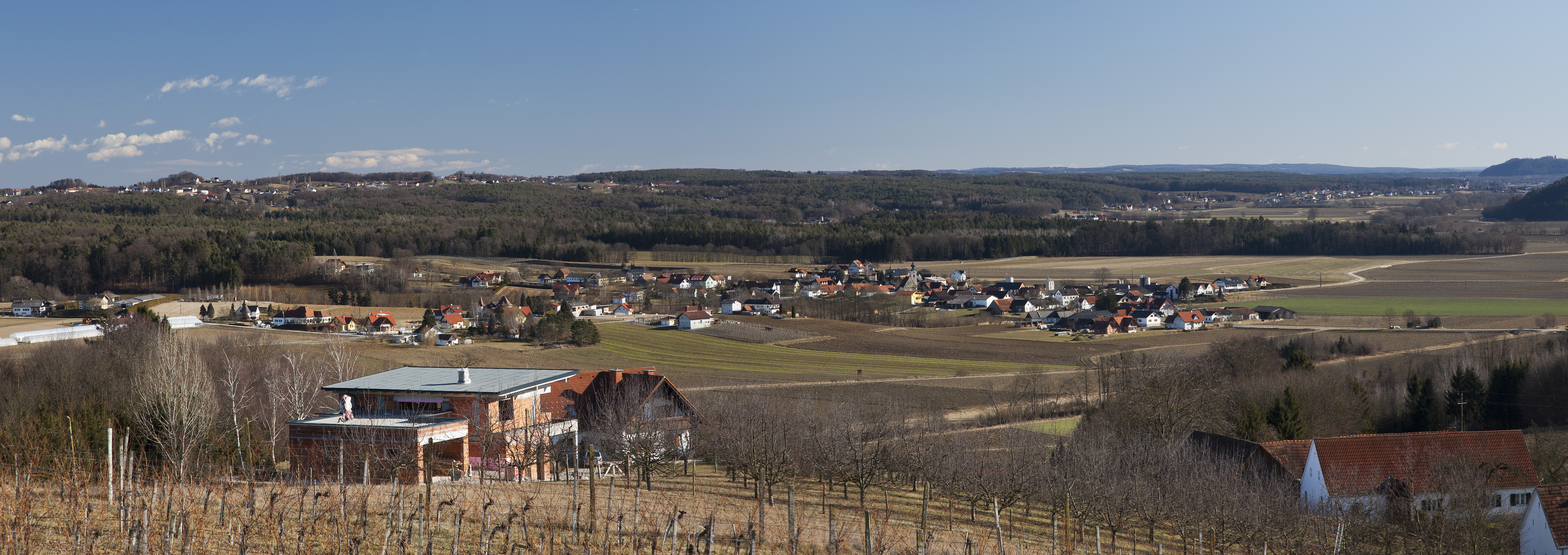 Sankt Kind von westen